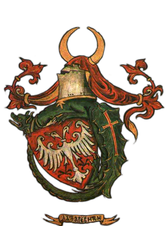 грб Лазаревића Licensing {